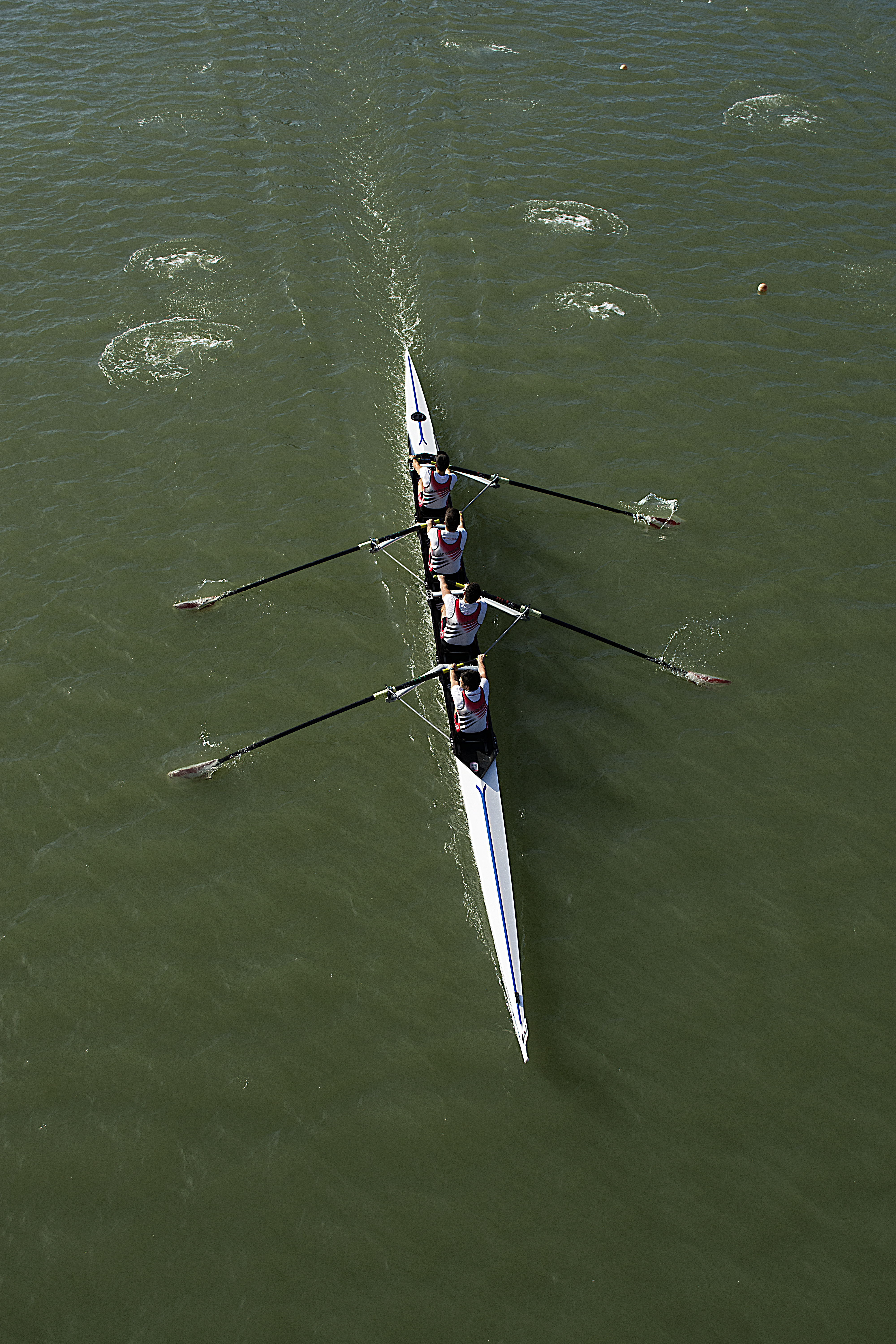 Entrenamiento de remo en el río Gudalquivir a su paso por Sevilla.